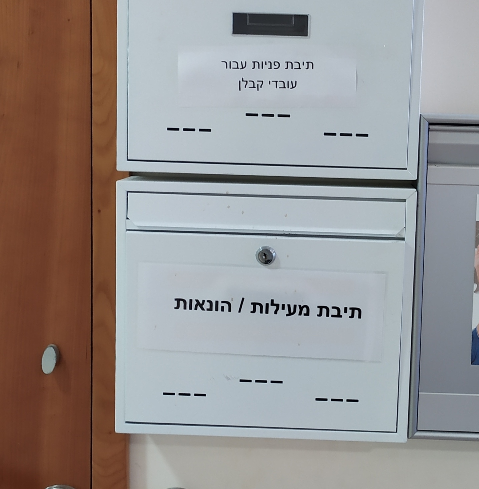 צולם בחברת ביטוח הפניקס